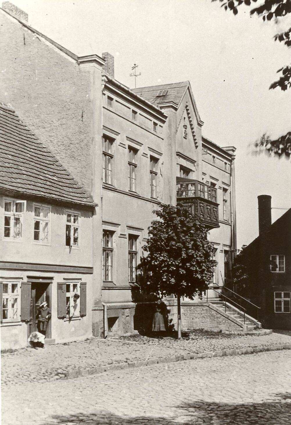 Rathaus von Gützkow 1910